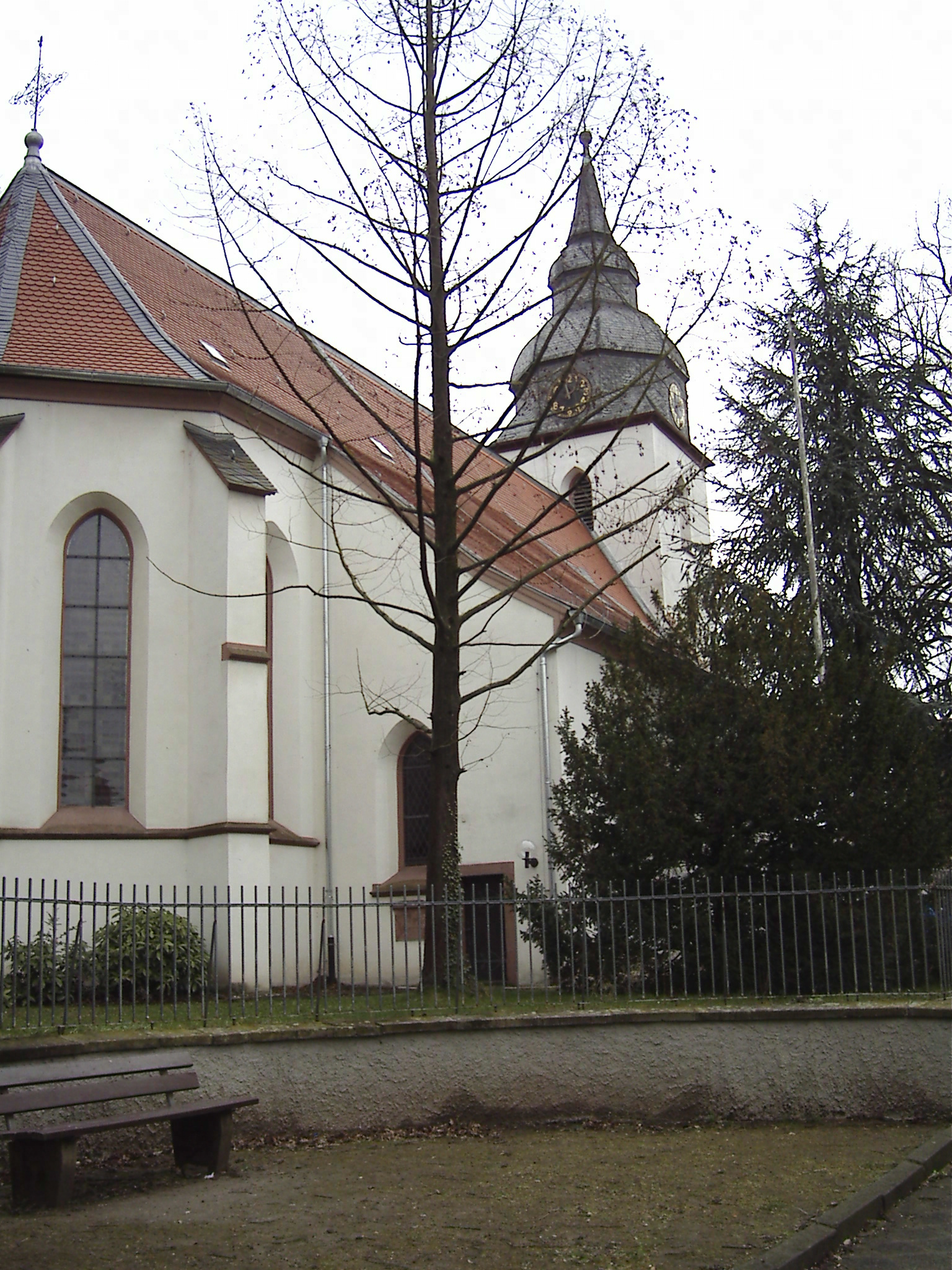 Evangelische Auferstehungskirche in Darmstadt-Arheilgen (Hessen)